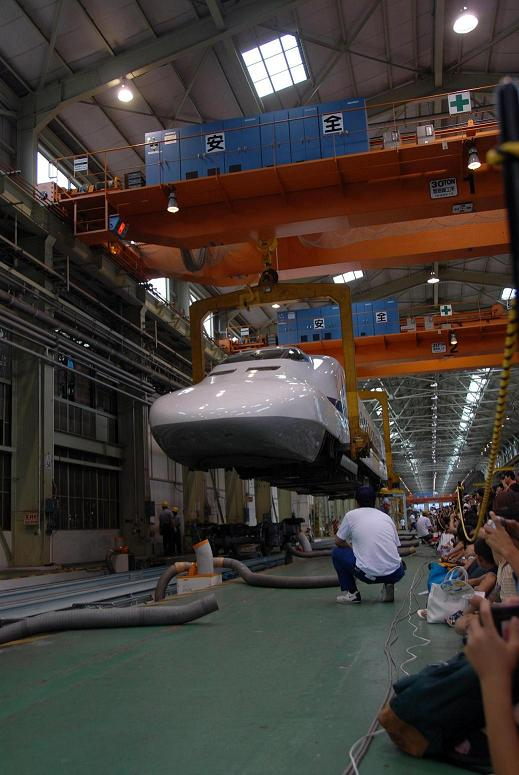 新幹線車体上げ実演 新幹線なるほど発見デー（2006年7月23日）